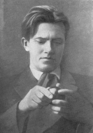 В. Маяковский. Фото 1912 г.